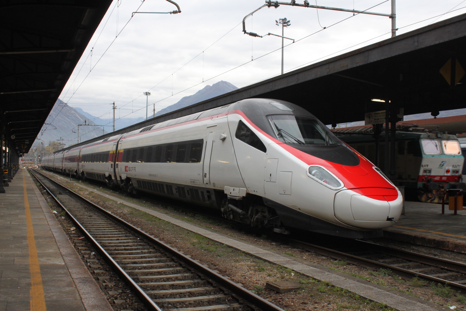 ETR 610 006 delle FFS espletante l'EC 50 Milano C.le — Basel SBB, visto di coda a Domodossola.